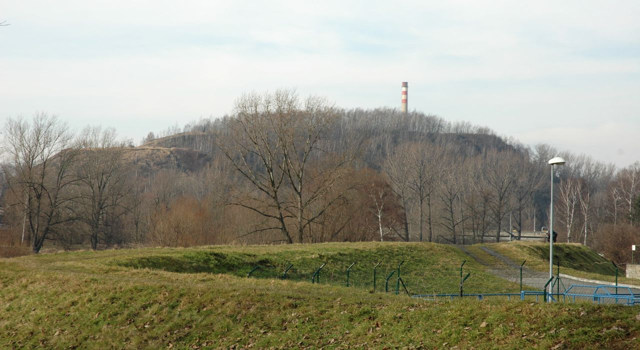 Halda Dolu Odra, Ostrava-Přívoz